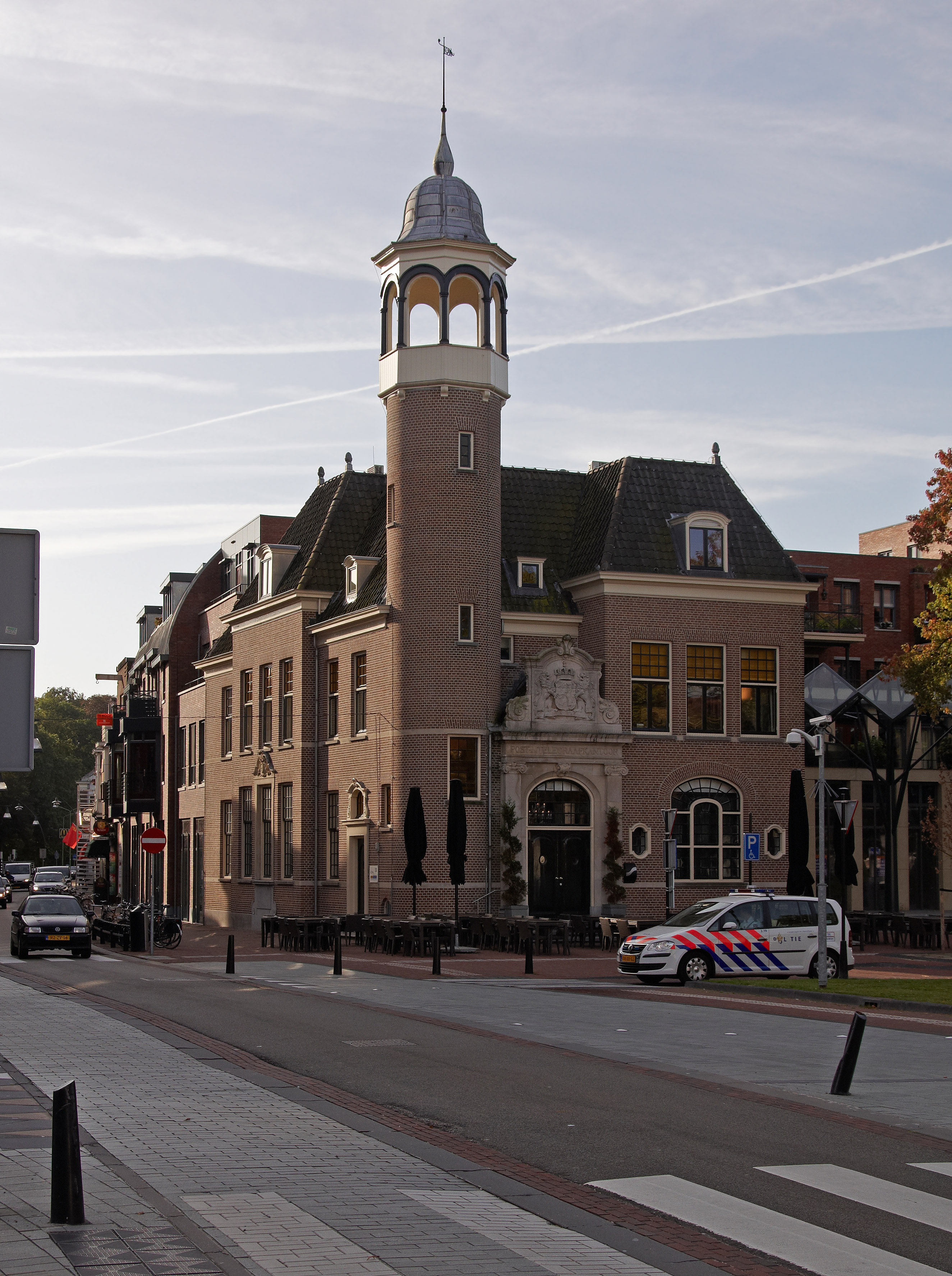 Het voormalige Post- en Telegraafkantoor aan het Rond te Zeist, Nederland